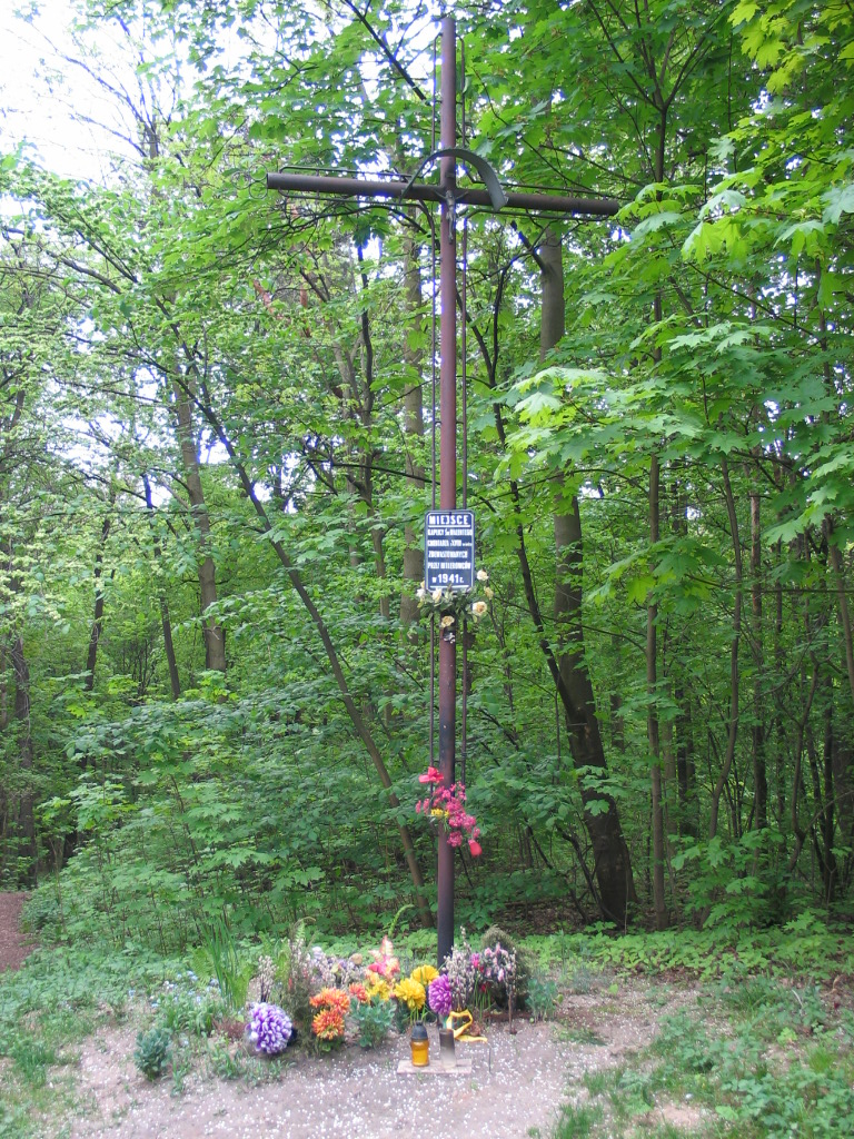 Miejsce po kaplicy św. Walentego w Łagiewnikach Łódź, cmentarza z XVIII w. zdewastowana przez hitlerowców w 1941 roku.